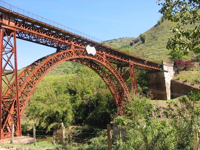 Foto do Viaduto Ferroviário Engenheiro Paulo de Frontin no município de Miguel Pereira, Estado do Rio de Janeiro. Com mais de 100 anos foi tombado pela Câmara Municipal como patrimônio histórico municipal. Ver: Paulo de Frontin